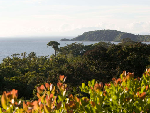 Vista lateral de la ciudad de La Palma, Darién.